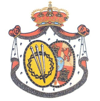 Escudo de la Hermandad dela Soledad de Priego de Córdoba